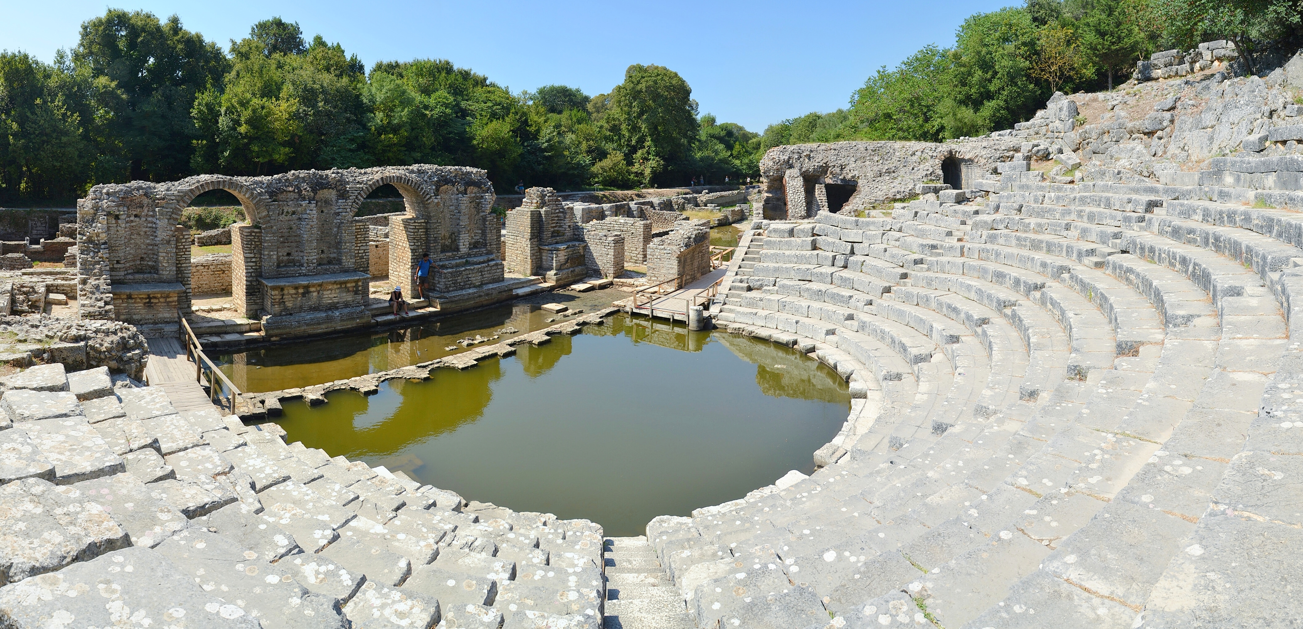 Qyteti Antik Ne ButrintShqip: Butrint, Albania - amphitheatre